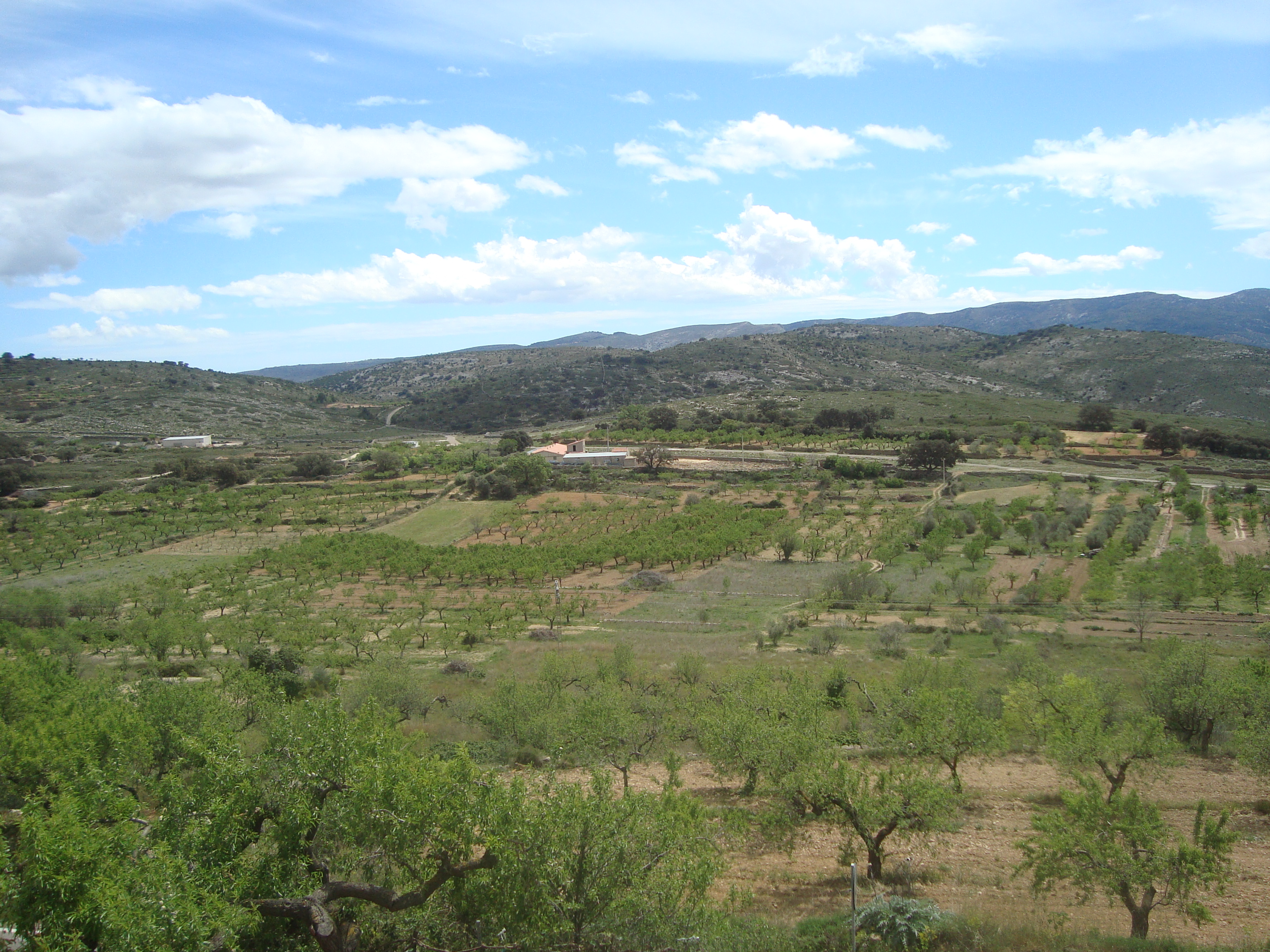 Panorámica rural, término municipal de Vilar de Canes